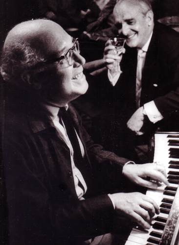 Ferenc Farkas jouant du piano chez lui à Budapest, 1970 Ænglisc: Ferenc Farkas playing the piano at his home in Budapest, 1970